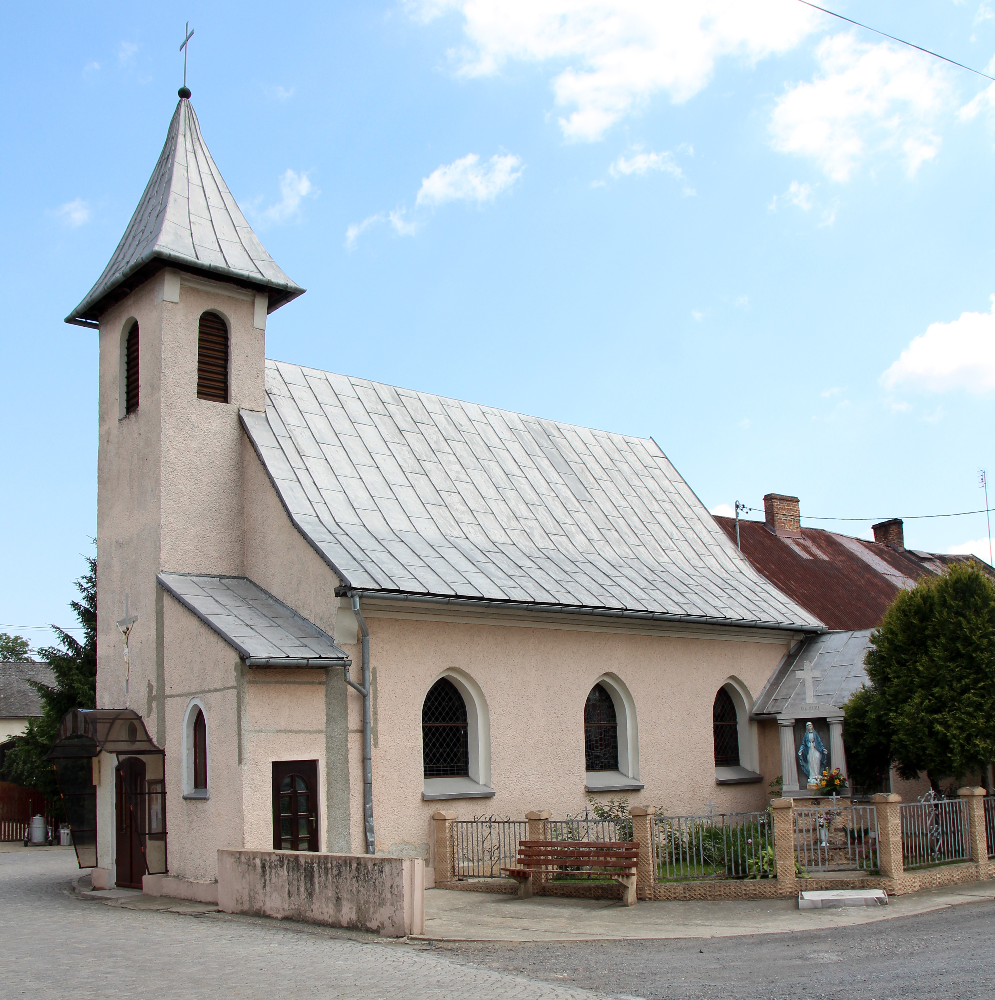 Jasiona - rzymskokatolicki kościół filialny pw. NMP, 1900, 1986